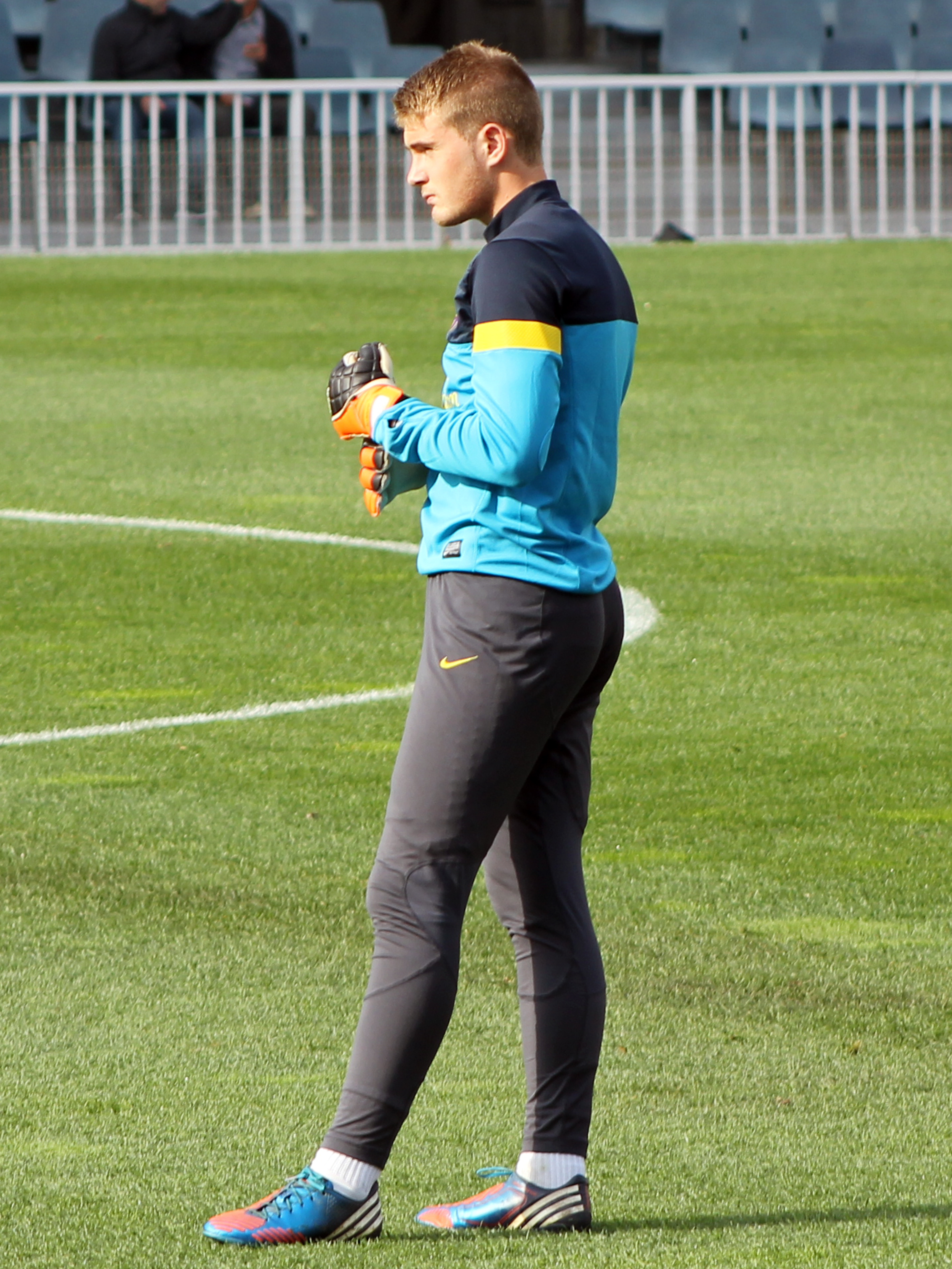 Foto realizada por Javier Segura (@castroquini en Twitter)